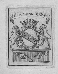 Familiewapen van de familie De Gady (Fribourg, Zwitserland).